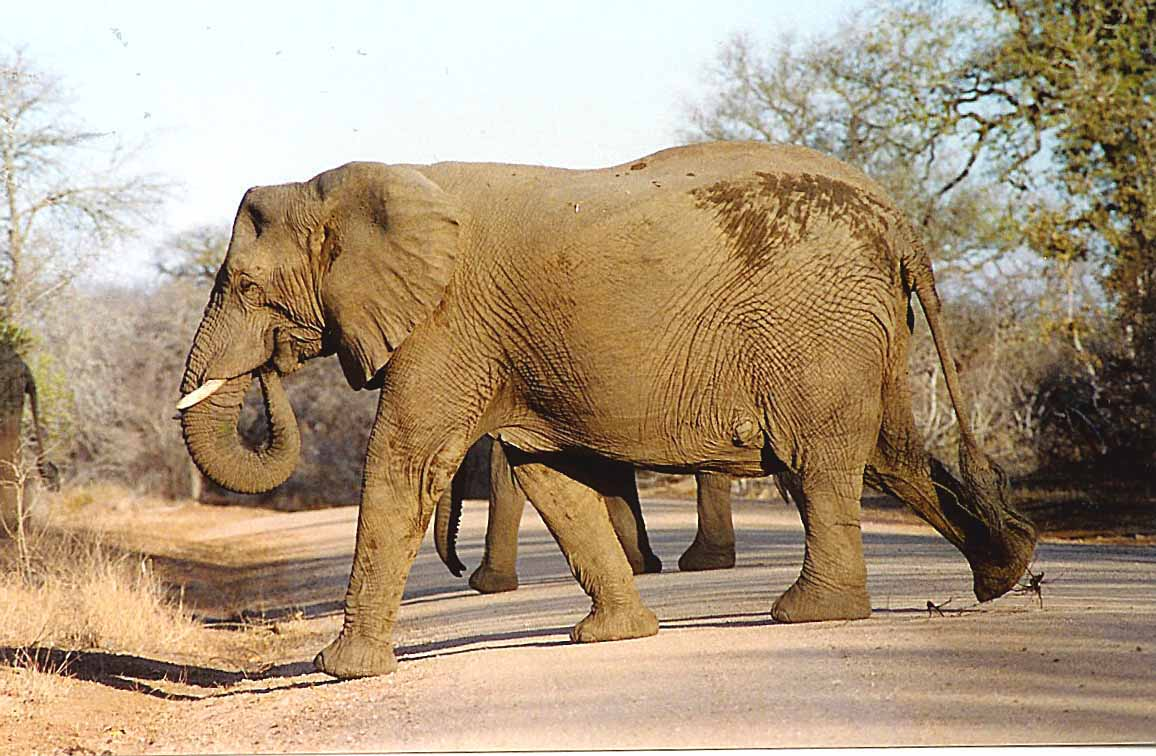 Elefant am Krügerpark